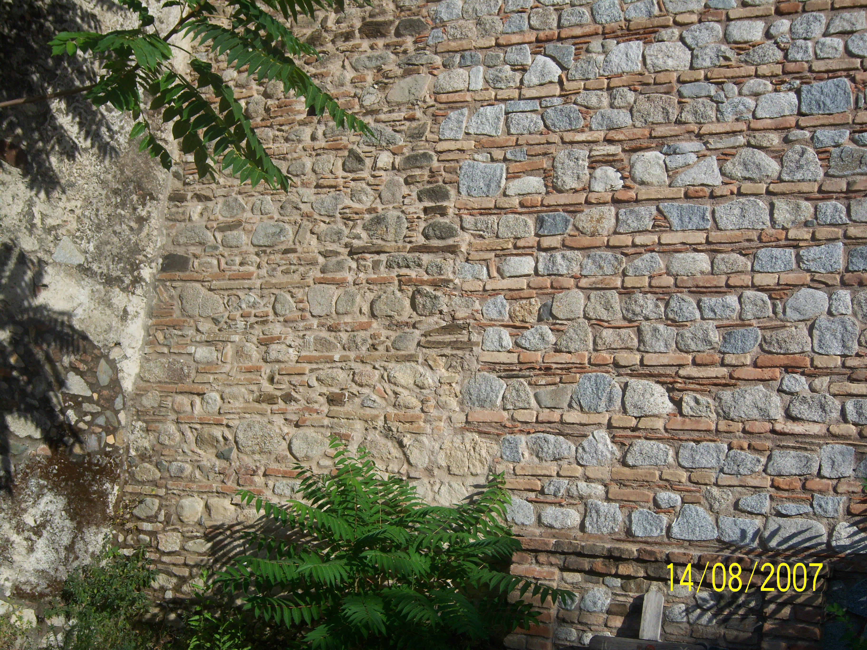 Particolare_parte_ristrutturata Therestis